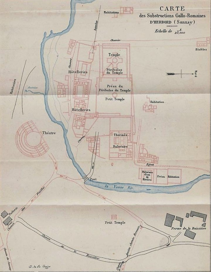 Plan du site de Sanxay dressé en 1883